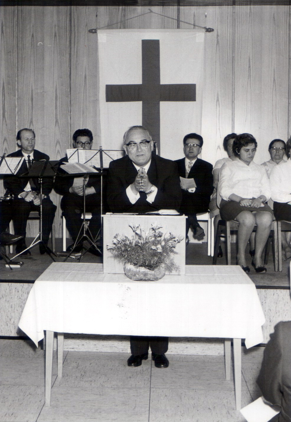 Prediger